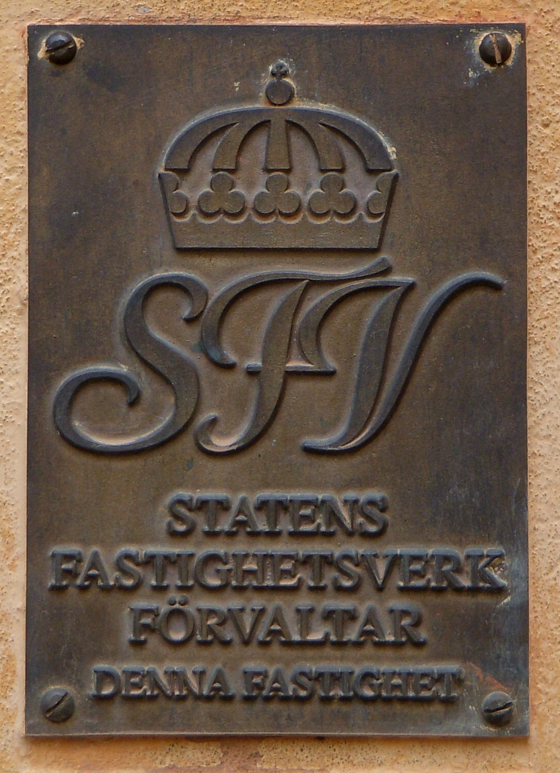 "Statens fastighetsverk" skylt på byggnad